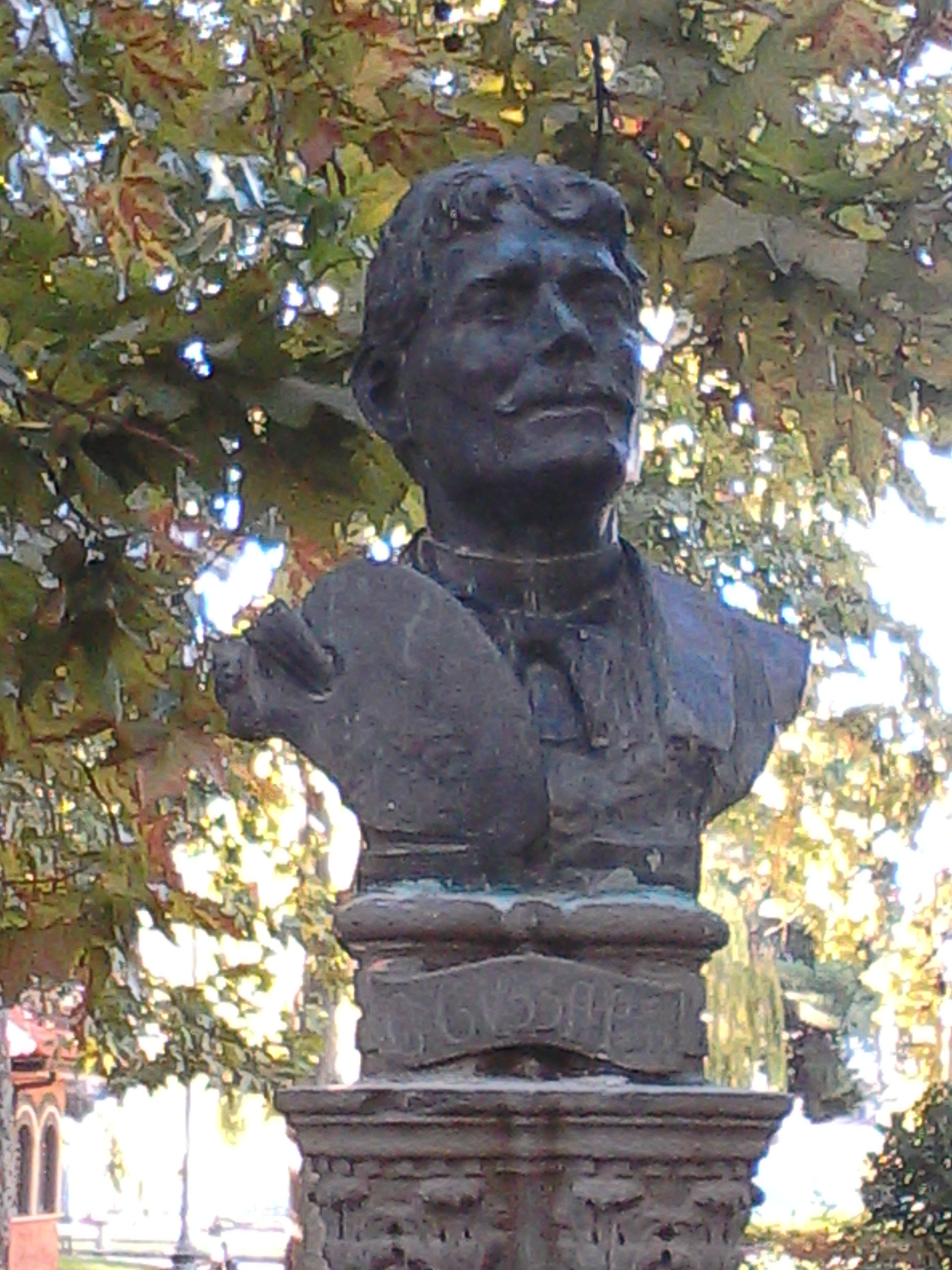 Giuseppe Guzzardi, Busto bronzeo, Villa comunale di Adrano (CT), opera dello scultore Angelo La Naia.